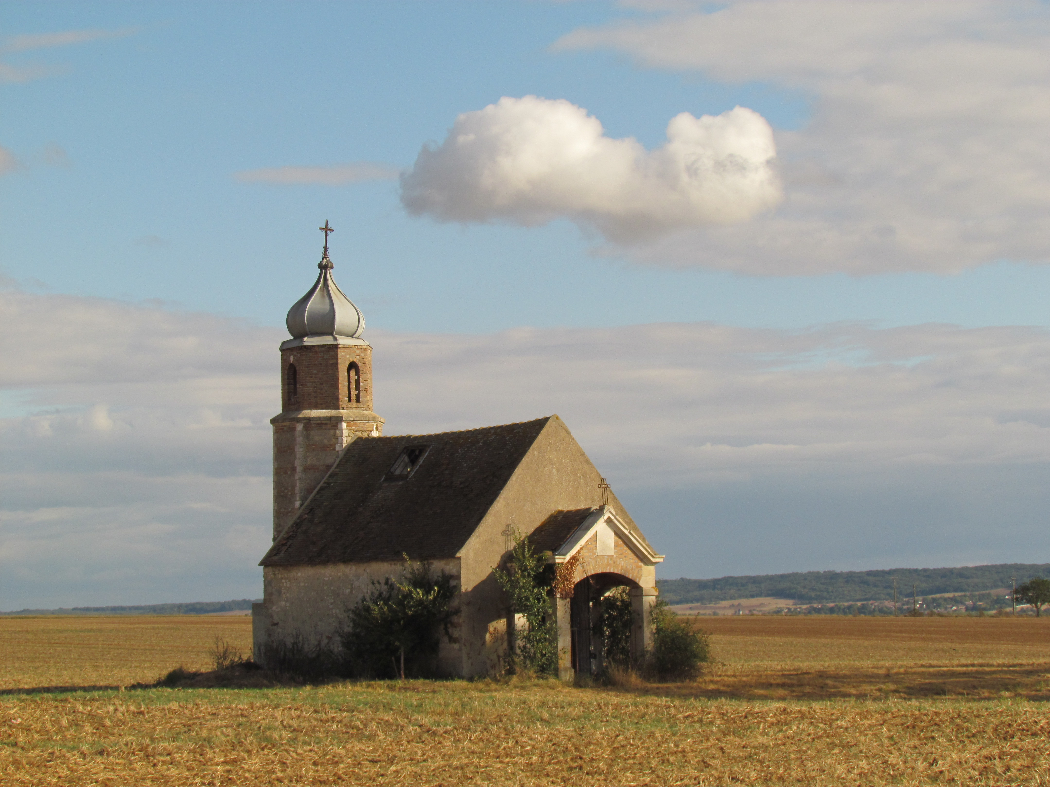 Chapelle Saint-André à Misy-sur-Yonne, Seine-et-Marne, France